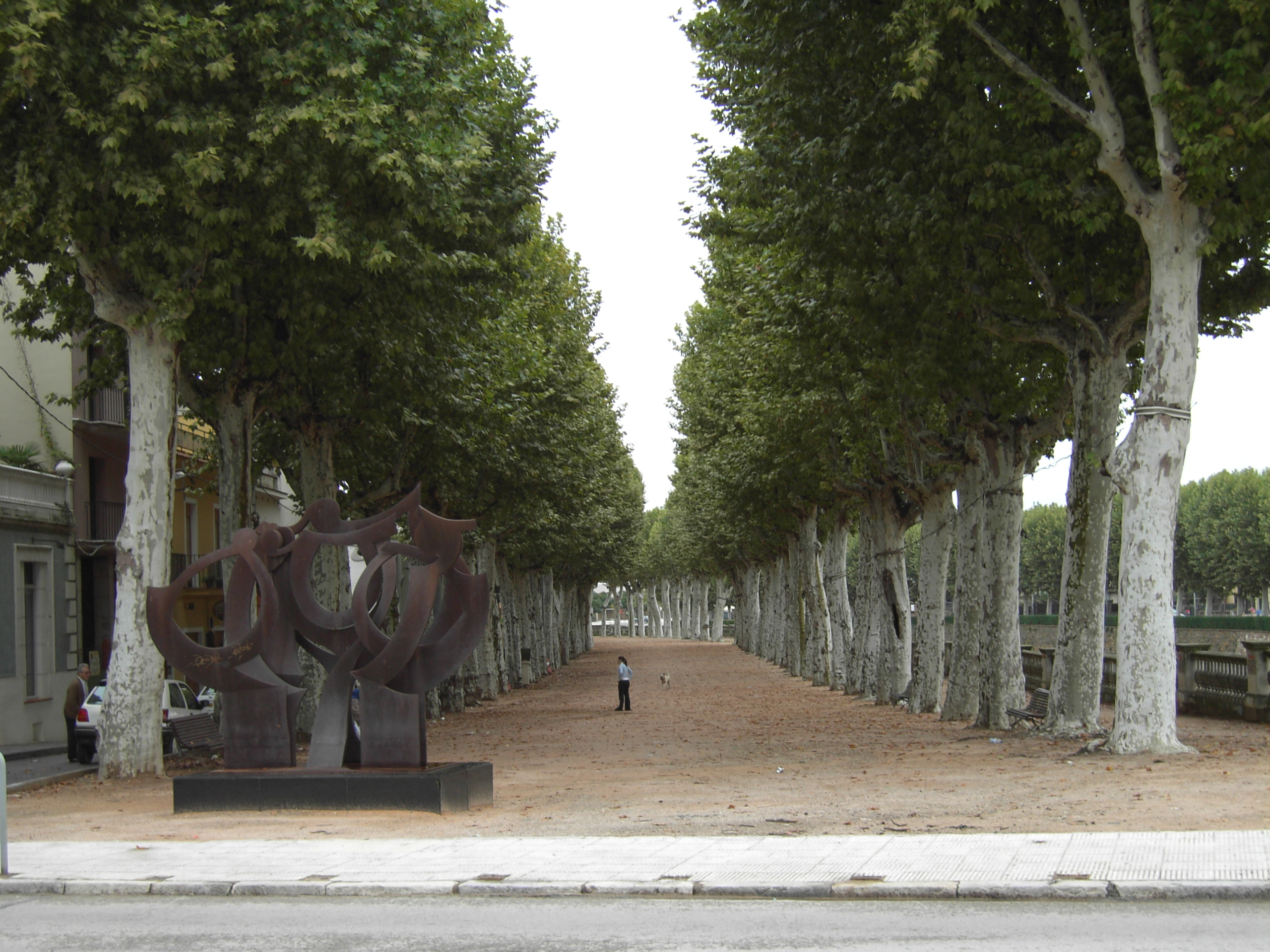 El Passeig, Promenade in La Bisbal d'Empordà, Catalonia